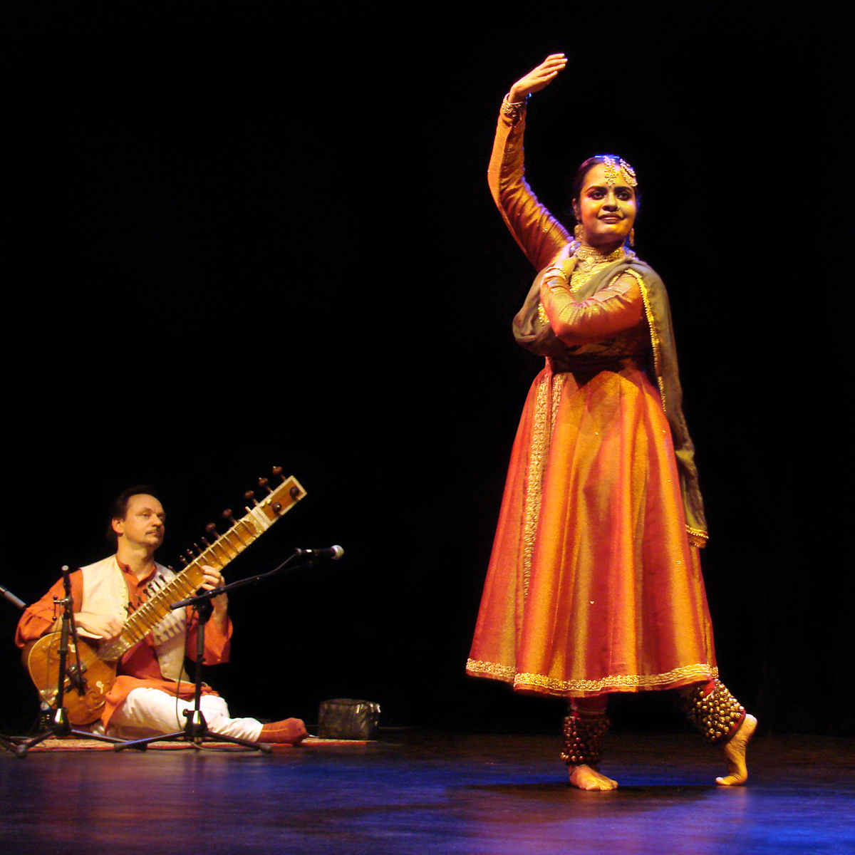 Anurekha Ghosh et ses musiciens (Michel Guay au sitar) « Abhisarika » Danse kathak (Inde du nord) Anurekha Ghosh est l’une des danseuses traditionnelles les plus en vue de sa génération, reconnue pour sa maîtrise de la danse Kathak.